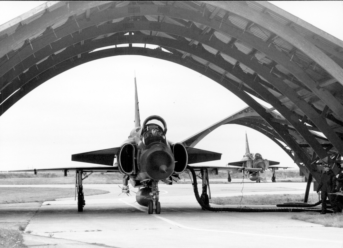 Klargöring av två flygplan JA 37 Viggen, tillhörande Bråvalla Flygflottilj (F 13), under Törebodabågar. Ur Flygvapenmuseums bildarkiv.